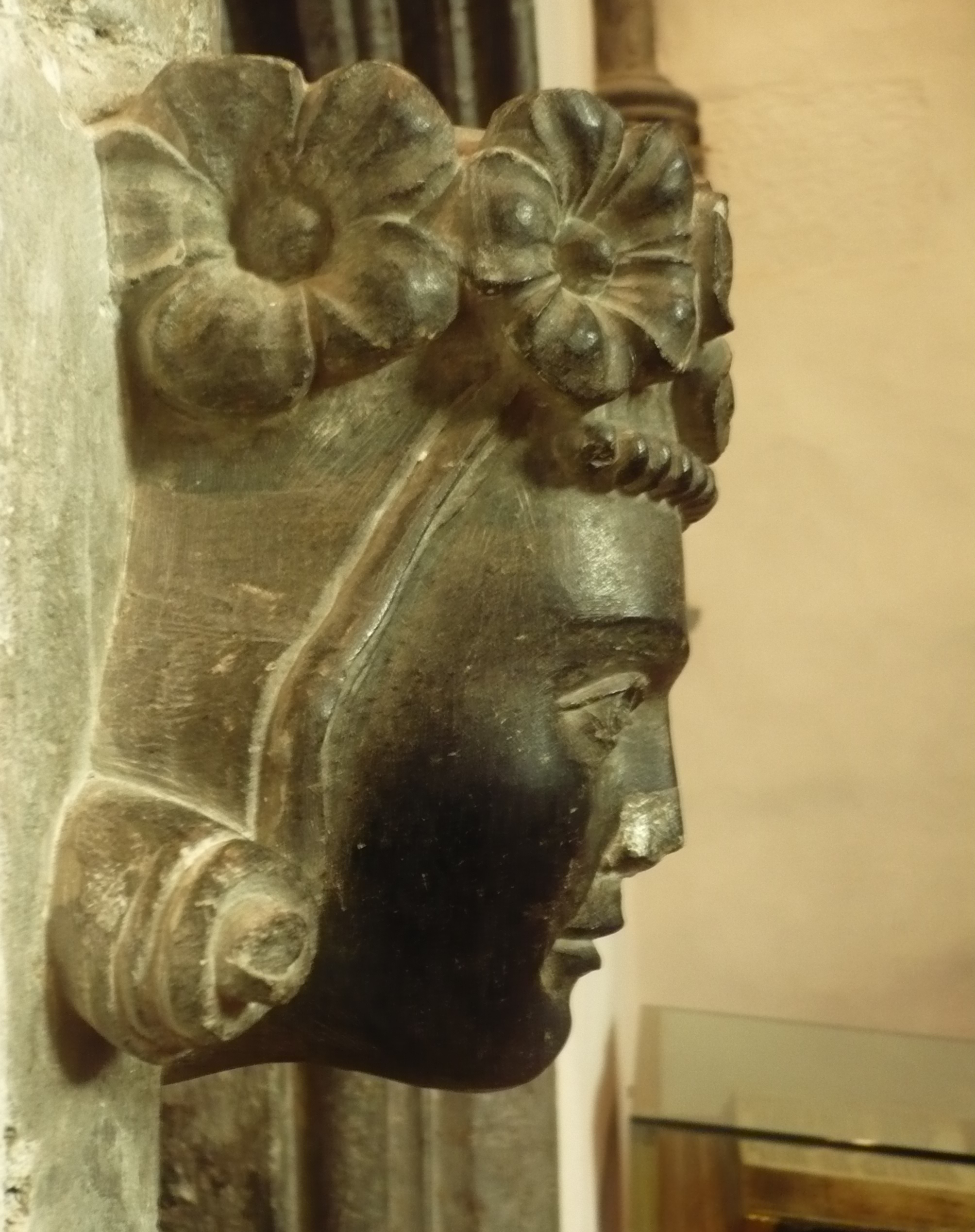 Skulptur som kan være av hertug og senere kong Håkon Magnusson. Den er koret i Stavanger Domkirke